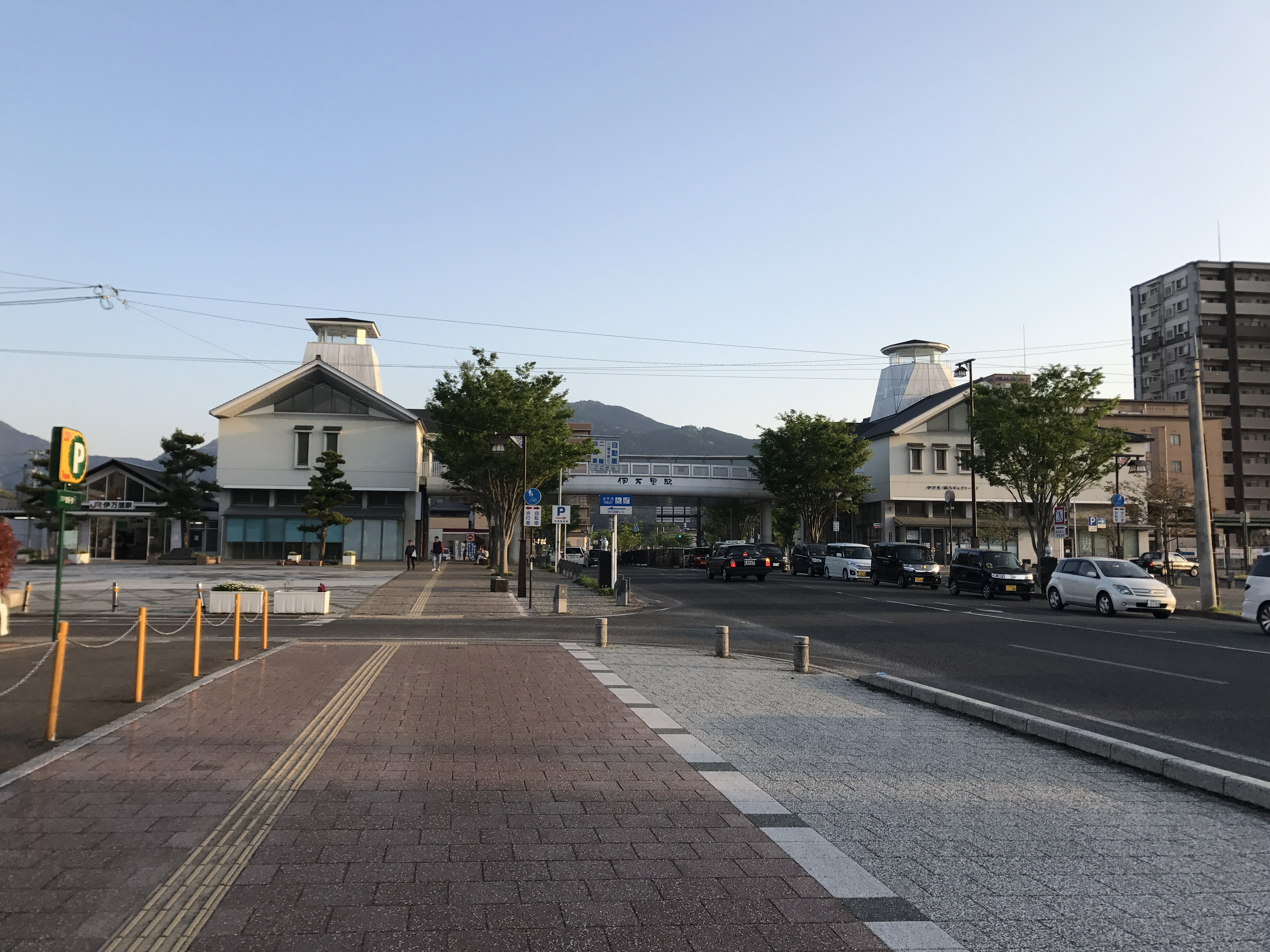 北側より望む伊万里駅(左側はJR駅舎、右側は松浦鉄道駅舎)